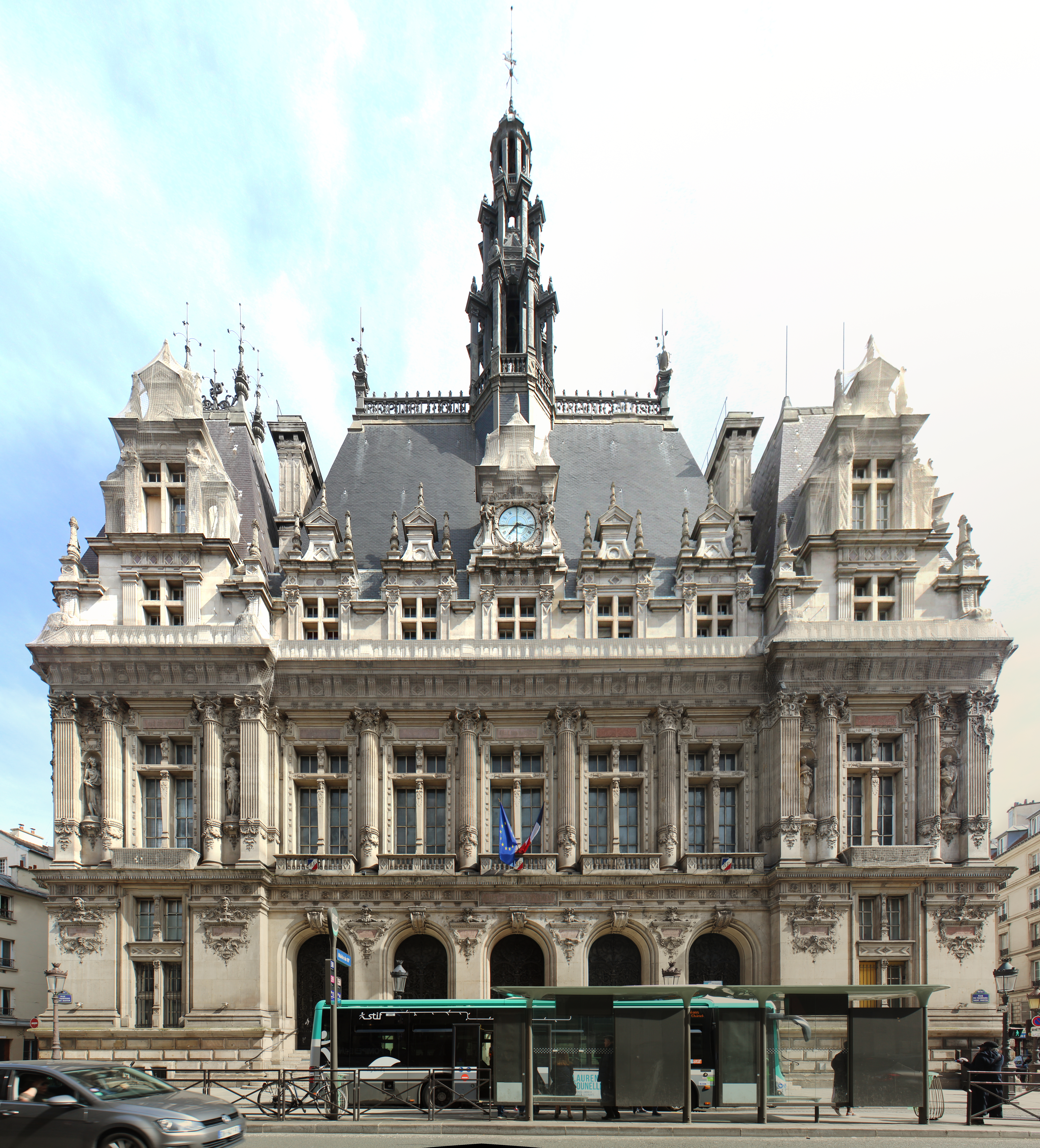 Mairie du 10e arrondissement de Paris.